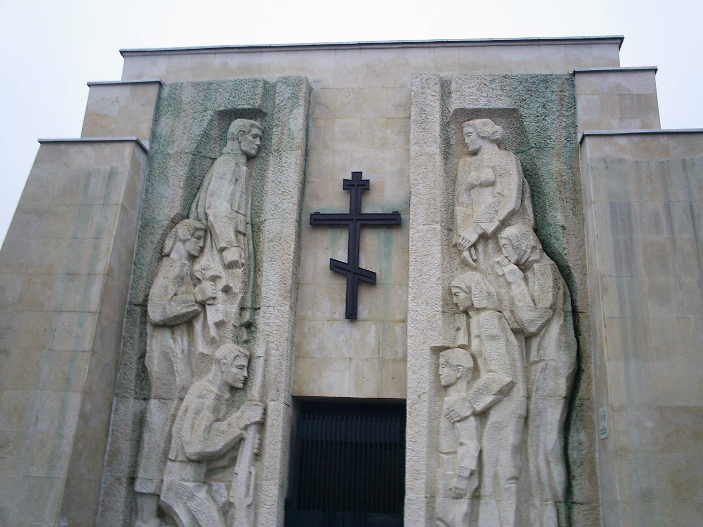 Костницата на Ботевите четници; © 2006 Свилен Енев